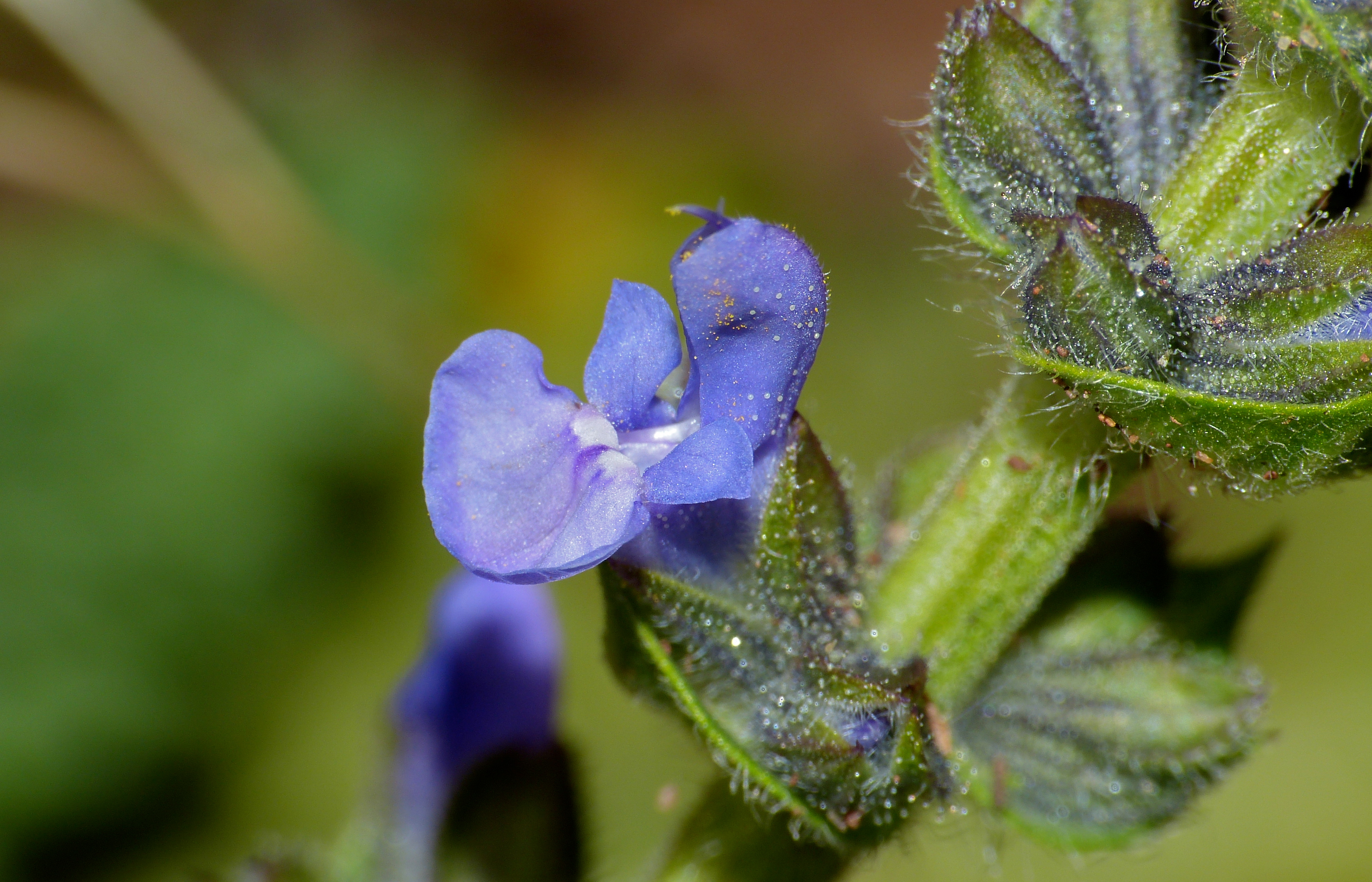 La Lieude, Mérifons, Hérault, FRANCE